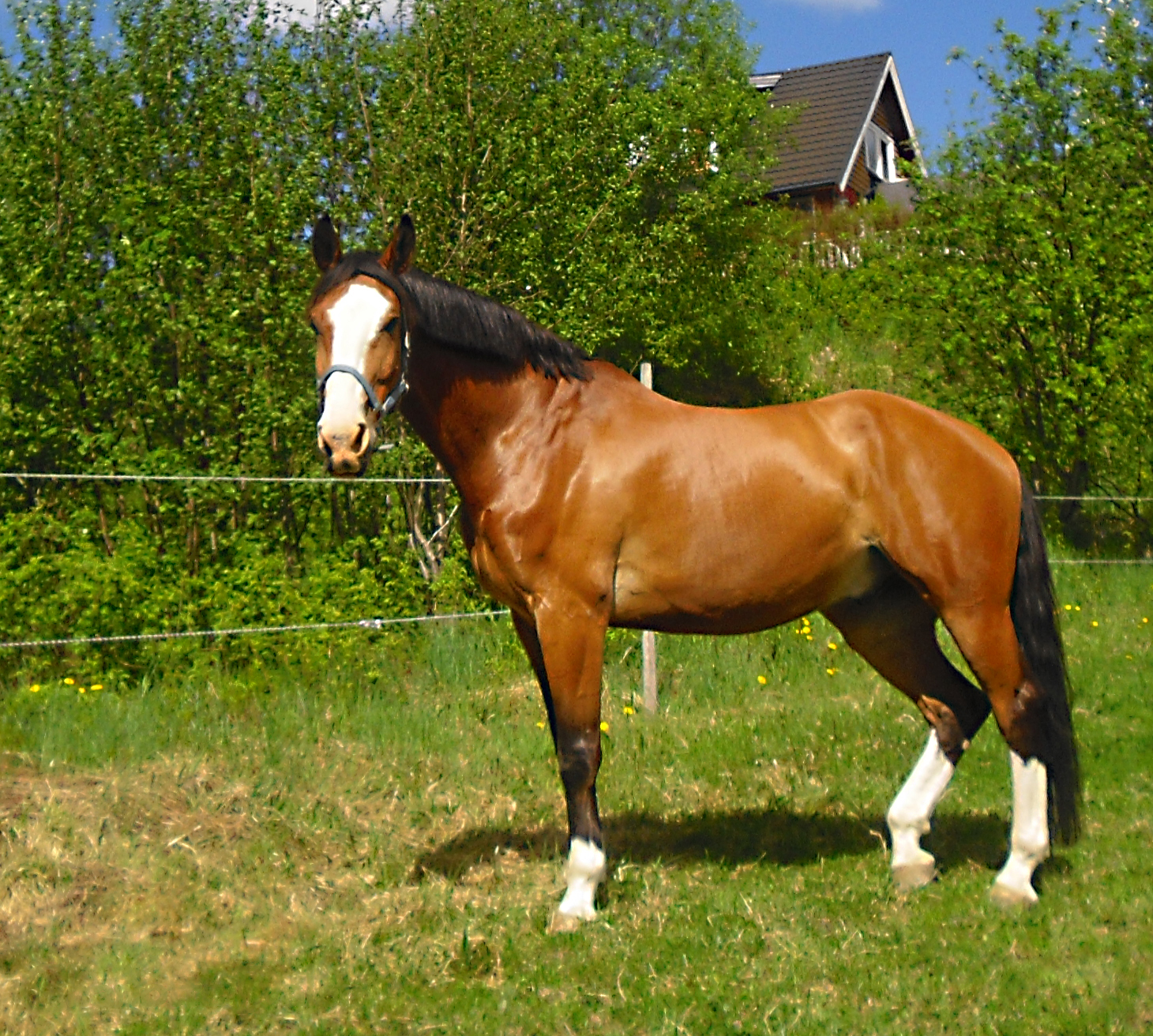 Dette er en holsteiner.